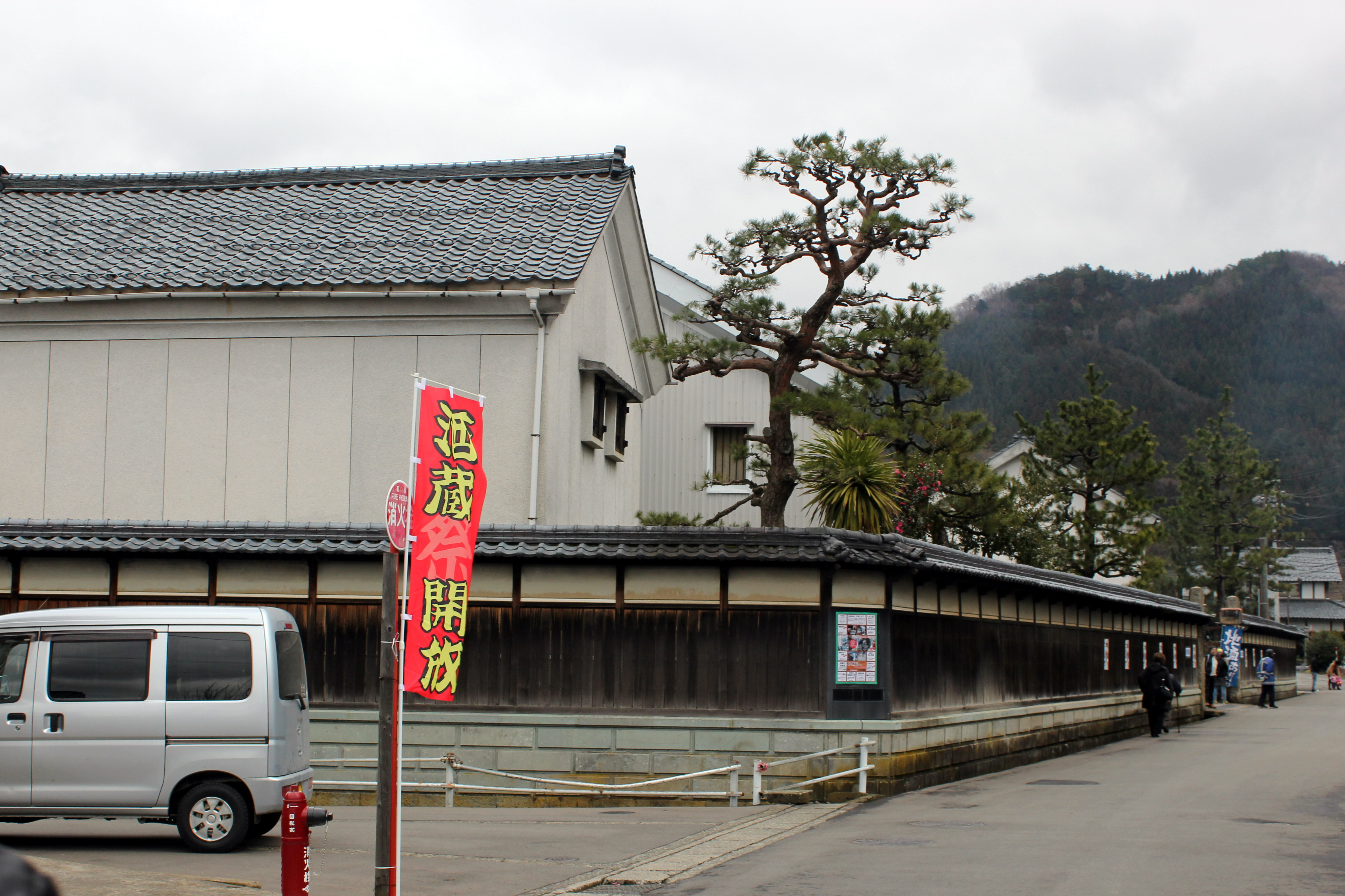 福井 久保田酒造合資会社（酒蔵解放イベントにて）